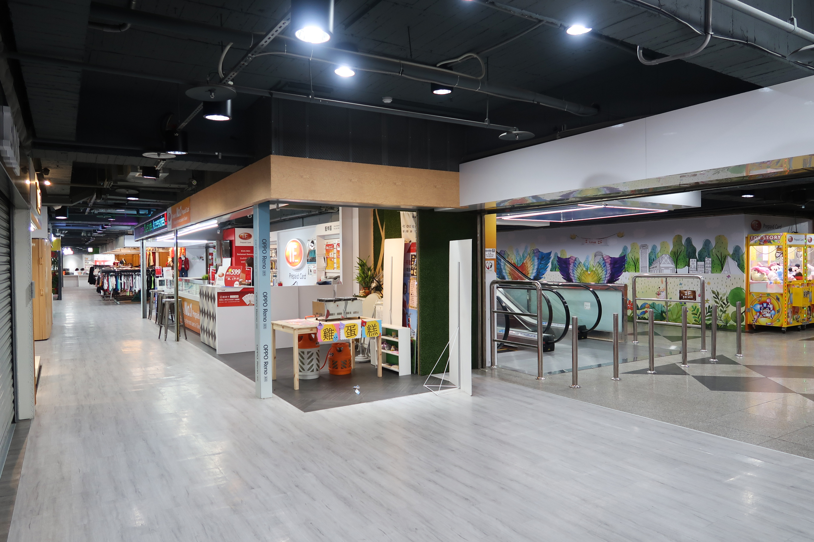 ASEAN Square Level 2